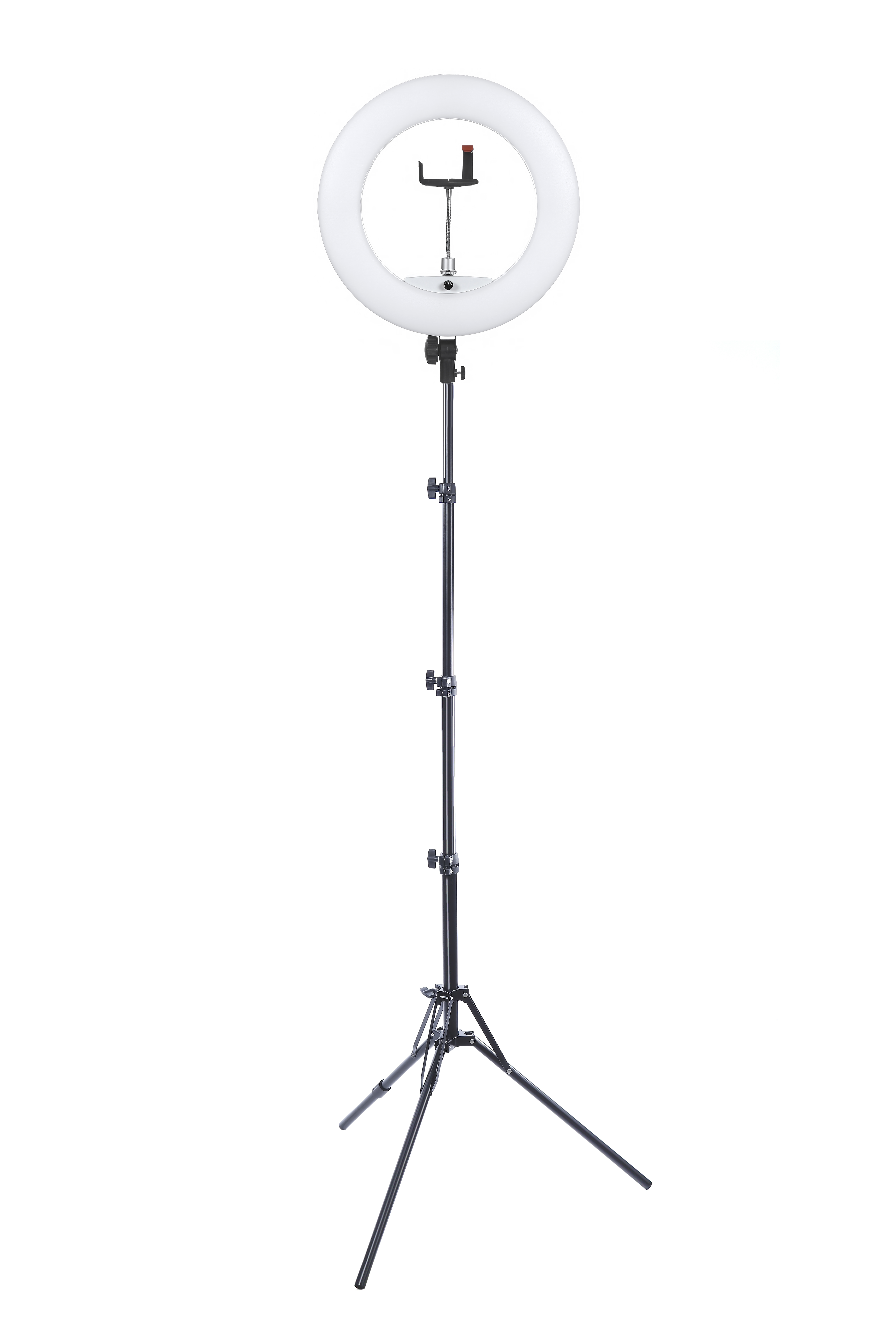 Общий вид кольцевой лампы на штативе-триноге. Высота регулируется от 60 до 220 см.